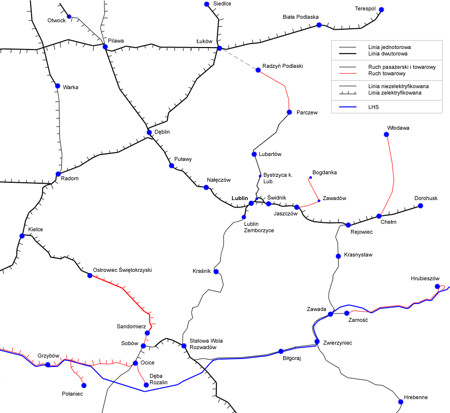 Mapa linii kolejowych w Województwie Lubelskim